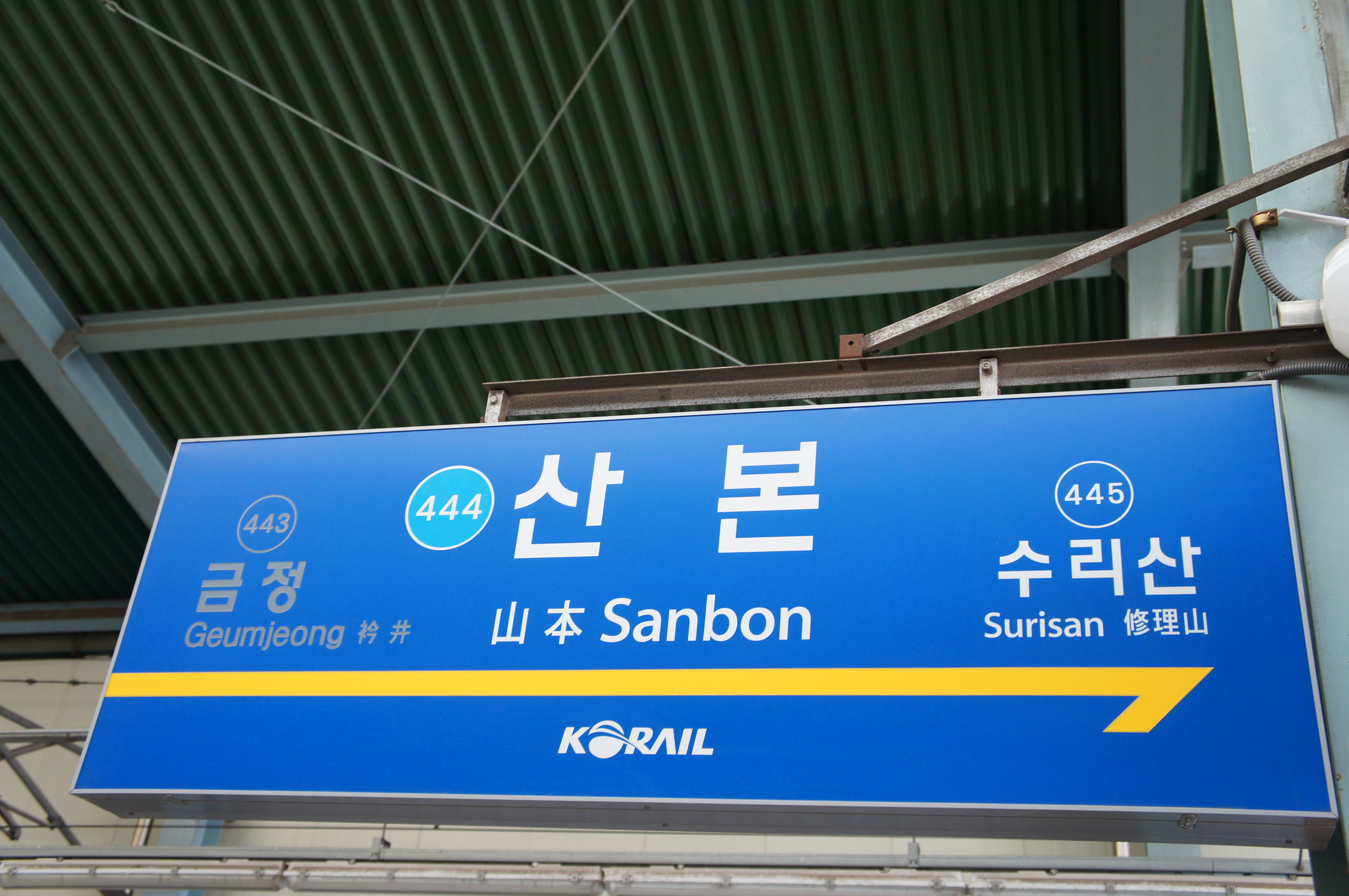 산본역 역명판